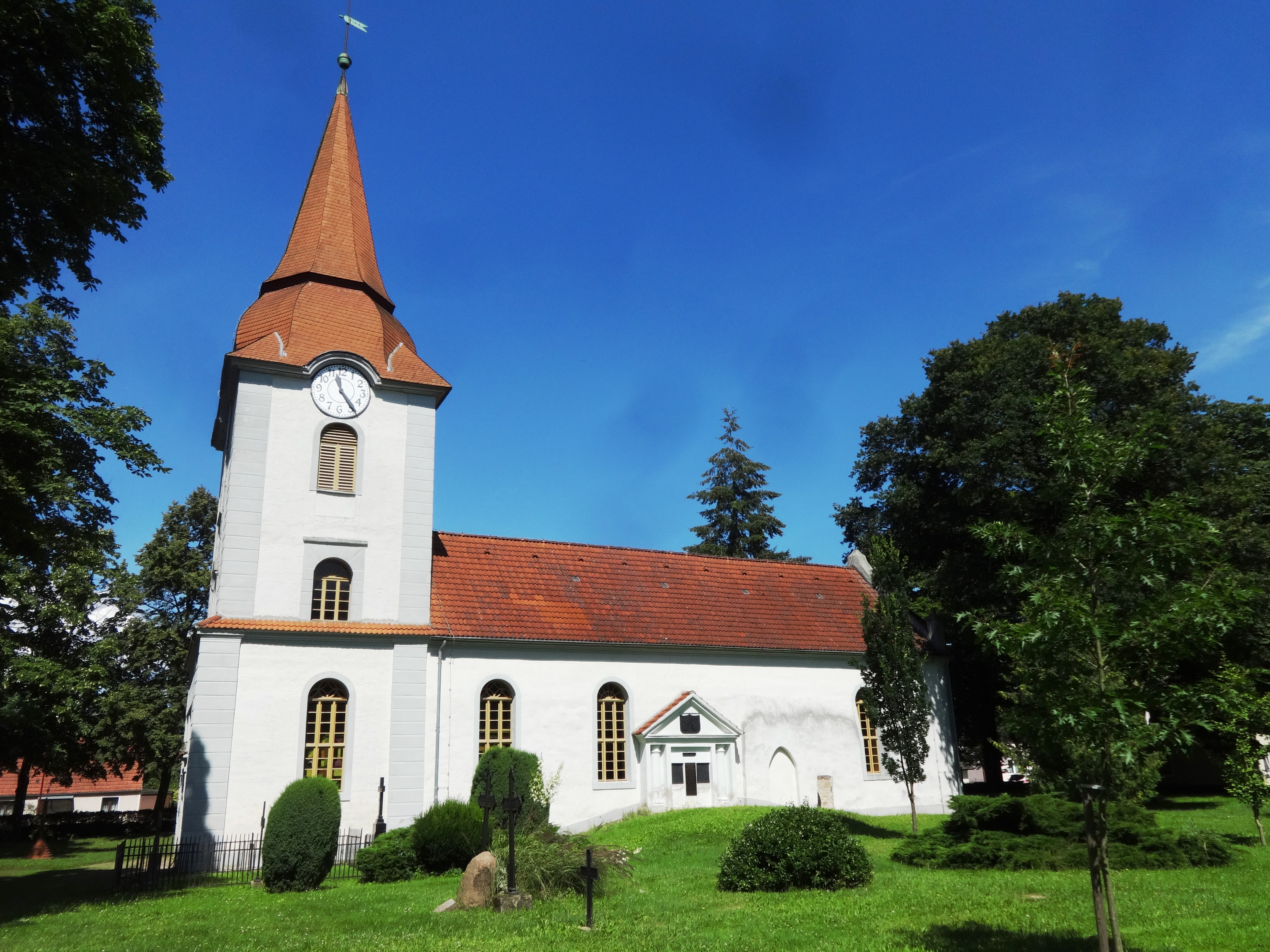 Die Kirche in Ducherow ist eine vermutlich aus dem 15. Jahrhundert stammende Feldsteinkirche. Im Innern befindet sich unter anderem ein qualitätsvoller Kanzelaltar aus dem 17. Jahrhundert.